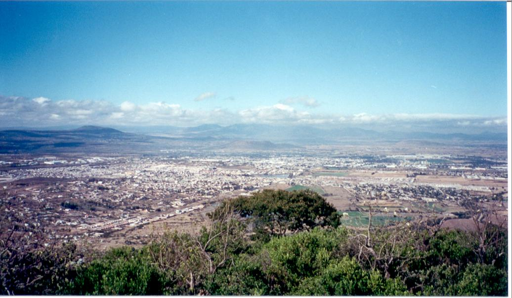 Vista parcial de San Juan del Río / Partial view of San Juan del Río